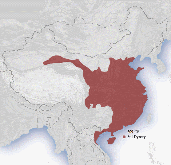 Sui Dynasty 589~609 CE.png